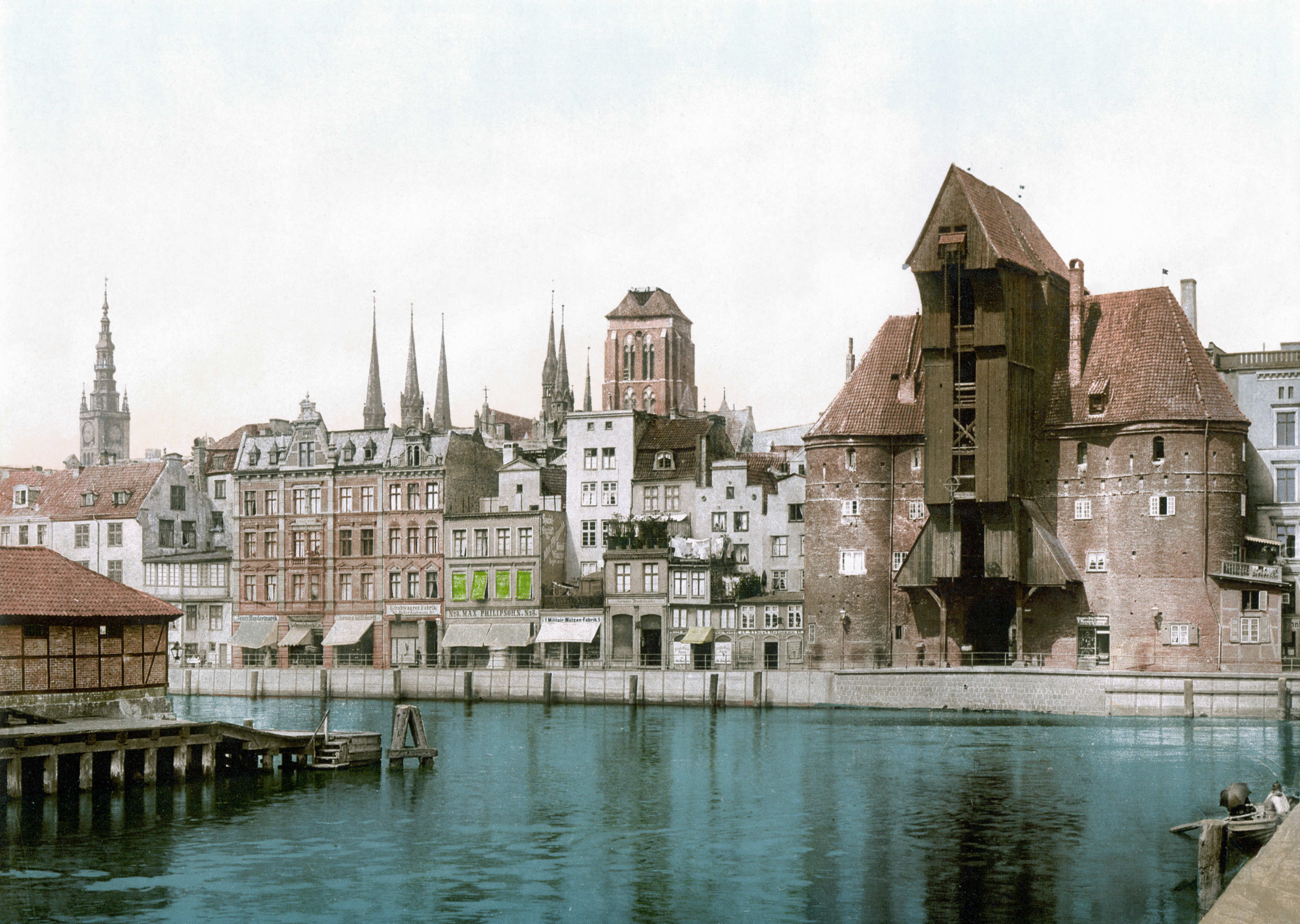 Danzig. Partie am Krahnthor. / ca. 1890-1900